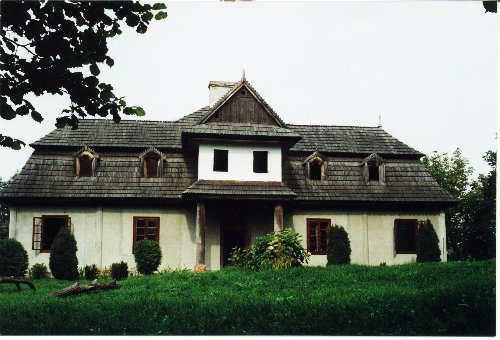 Stary Dwór w Goszycach